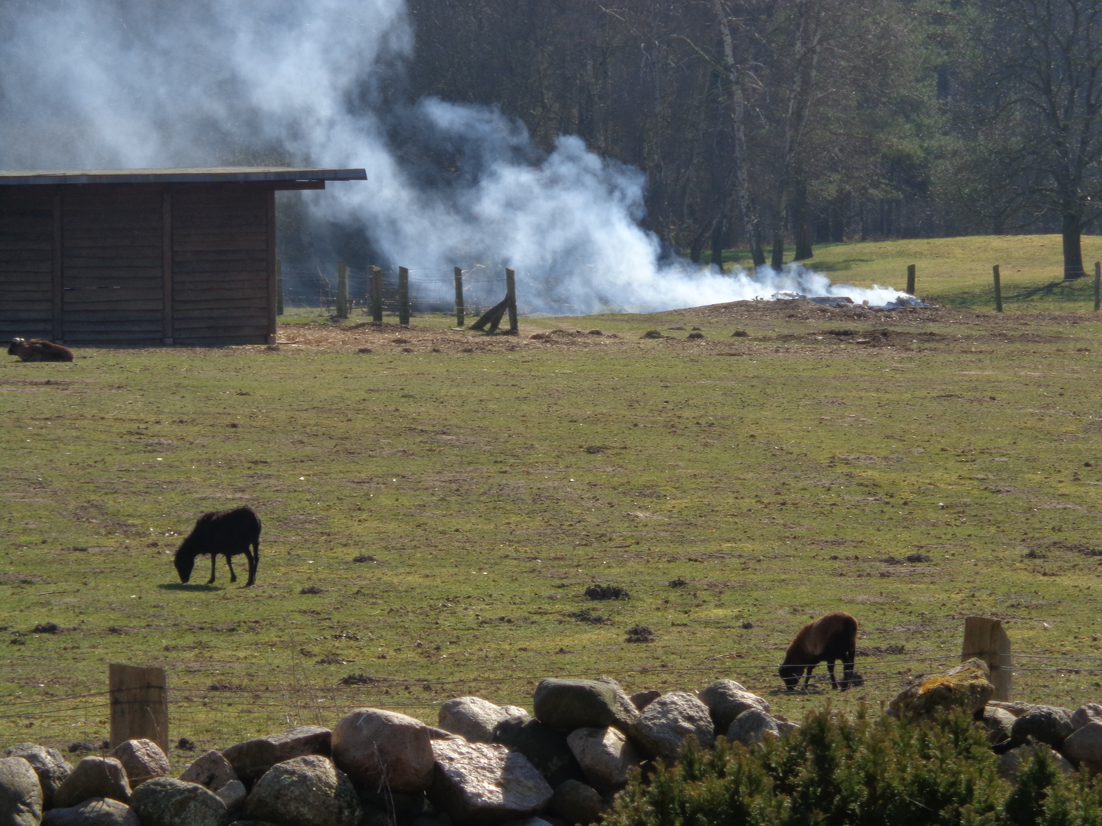 Rauch eines Laubfeuers